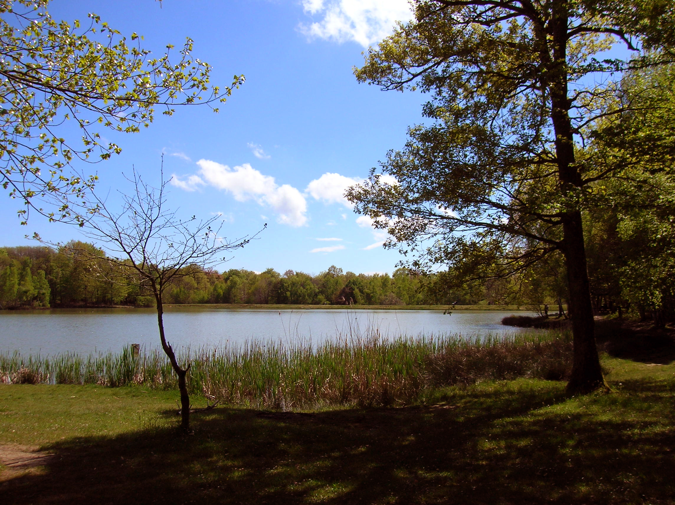 Étang des Essarts, parc naturel de Chambaran.